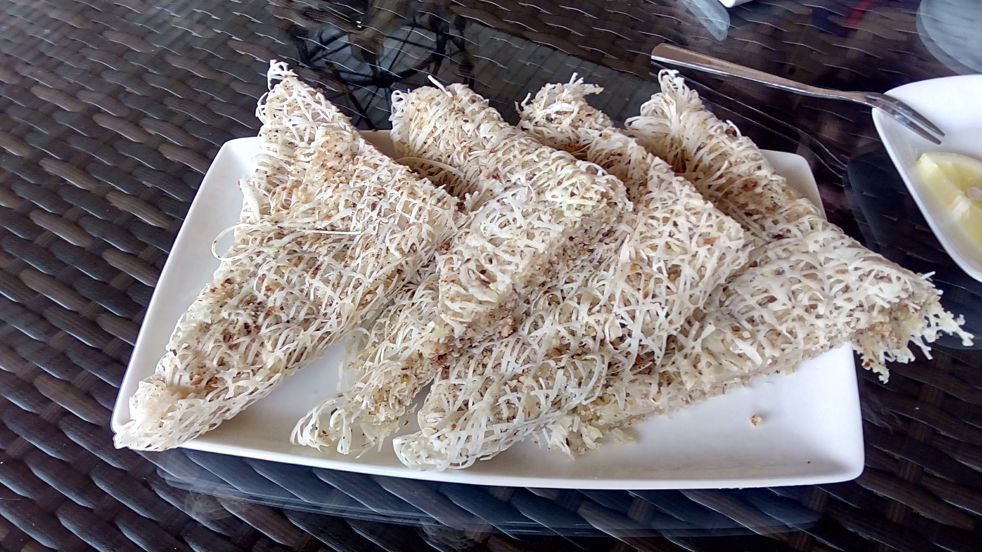 2018 Bahar vikidüşərgəsi